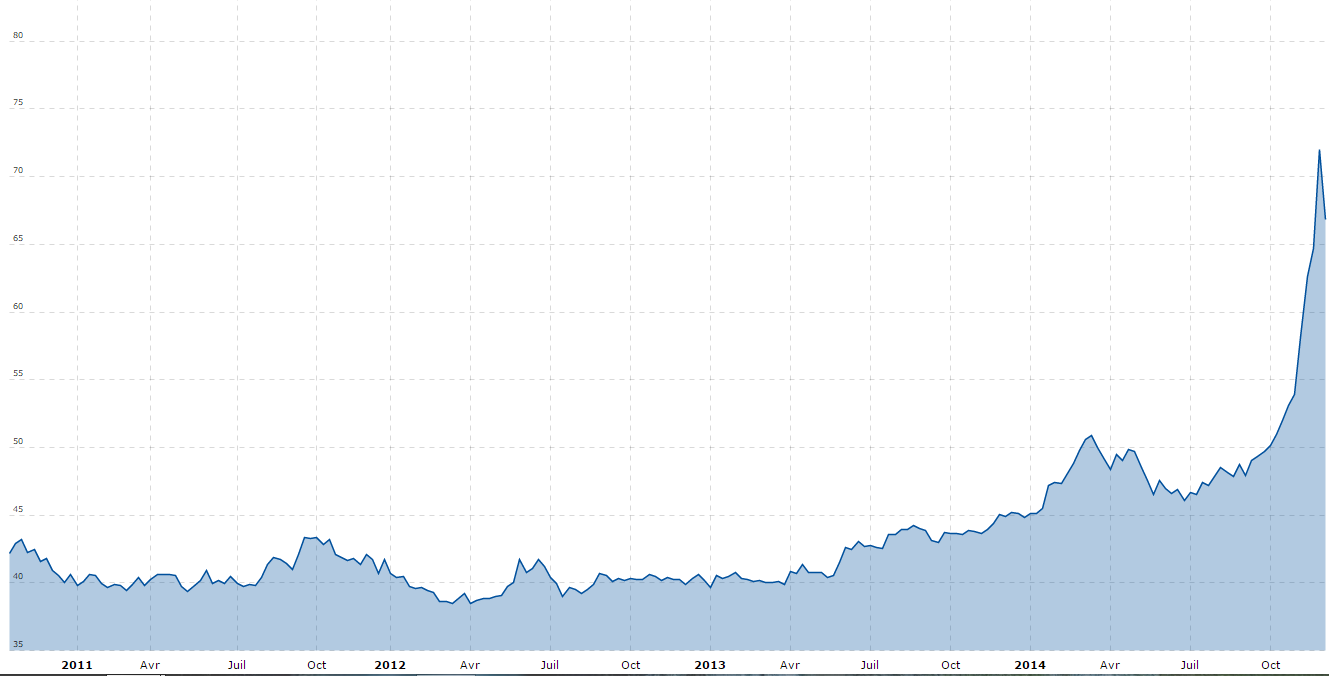 Euro vs Rouble depuis le 22 oct 2010 jusqu'au 23 dec 2014